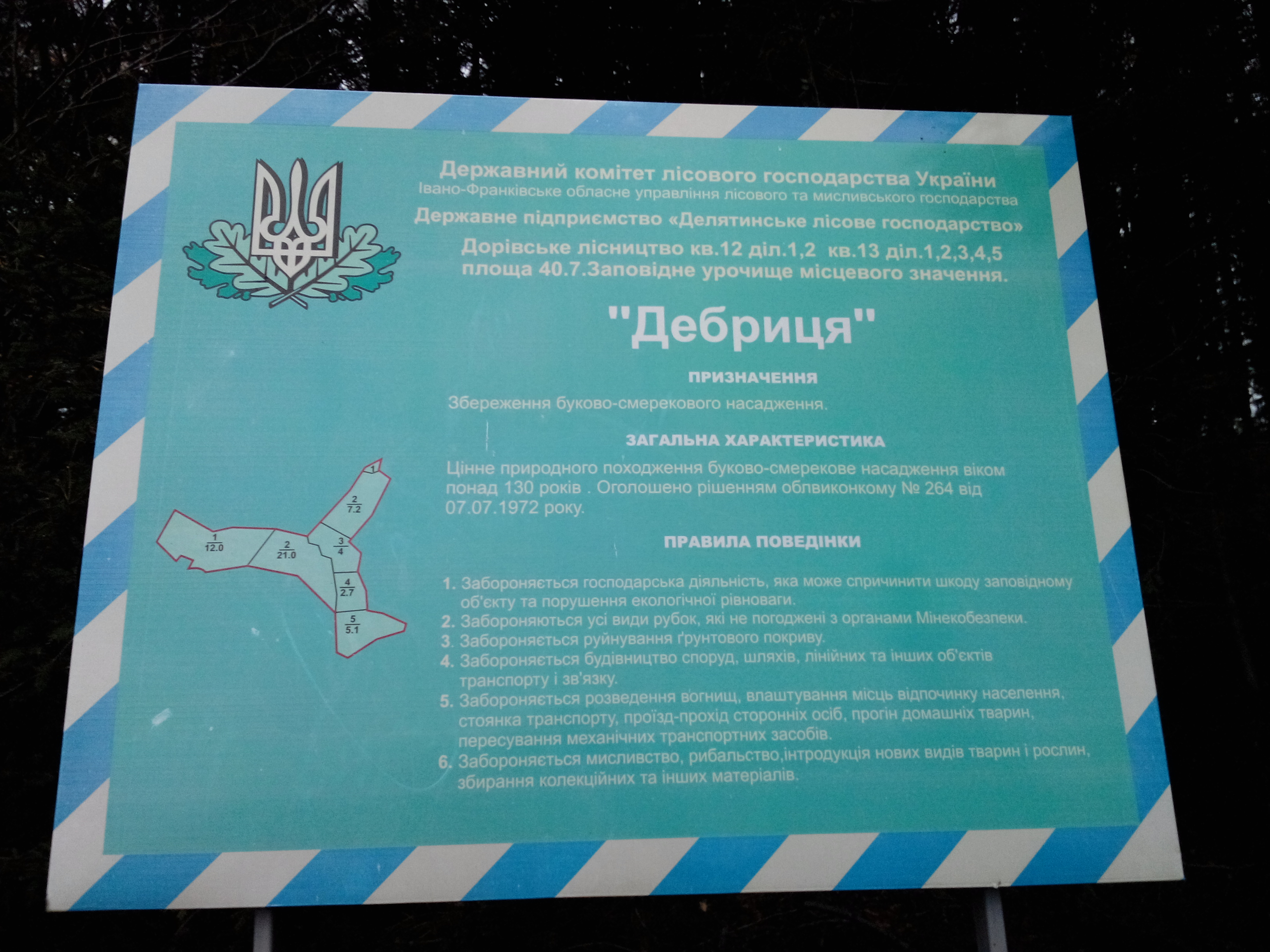 Інформаційна таблиця урочища